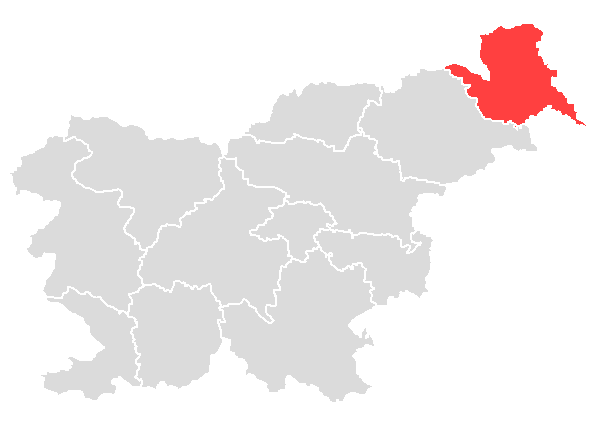 Pomurska statistična regija